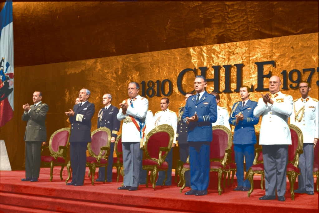 Junta militar y Augusto Pinochet Ugarte, en el edificio Diego Portales, para una nueva celebración de la Constitución. En primera fila, de izquierda a derecha: César Mendoza, José Toribio Merino, Augusto Pinochet, Fernando Matthei, y Humberto Gordon.